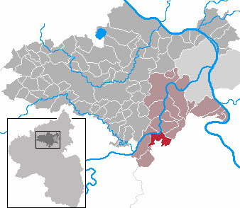 Brodenbach in Rhineland-Palatinate - district Mayen-Koblenz